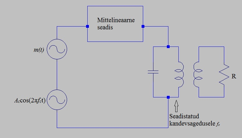 Mittelineaarse seadisega kahekülgriba amplituudmodulaator